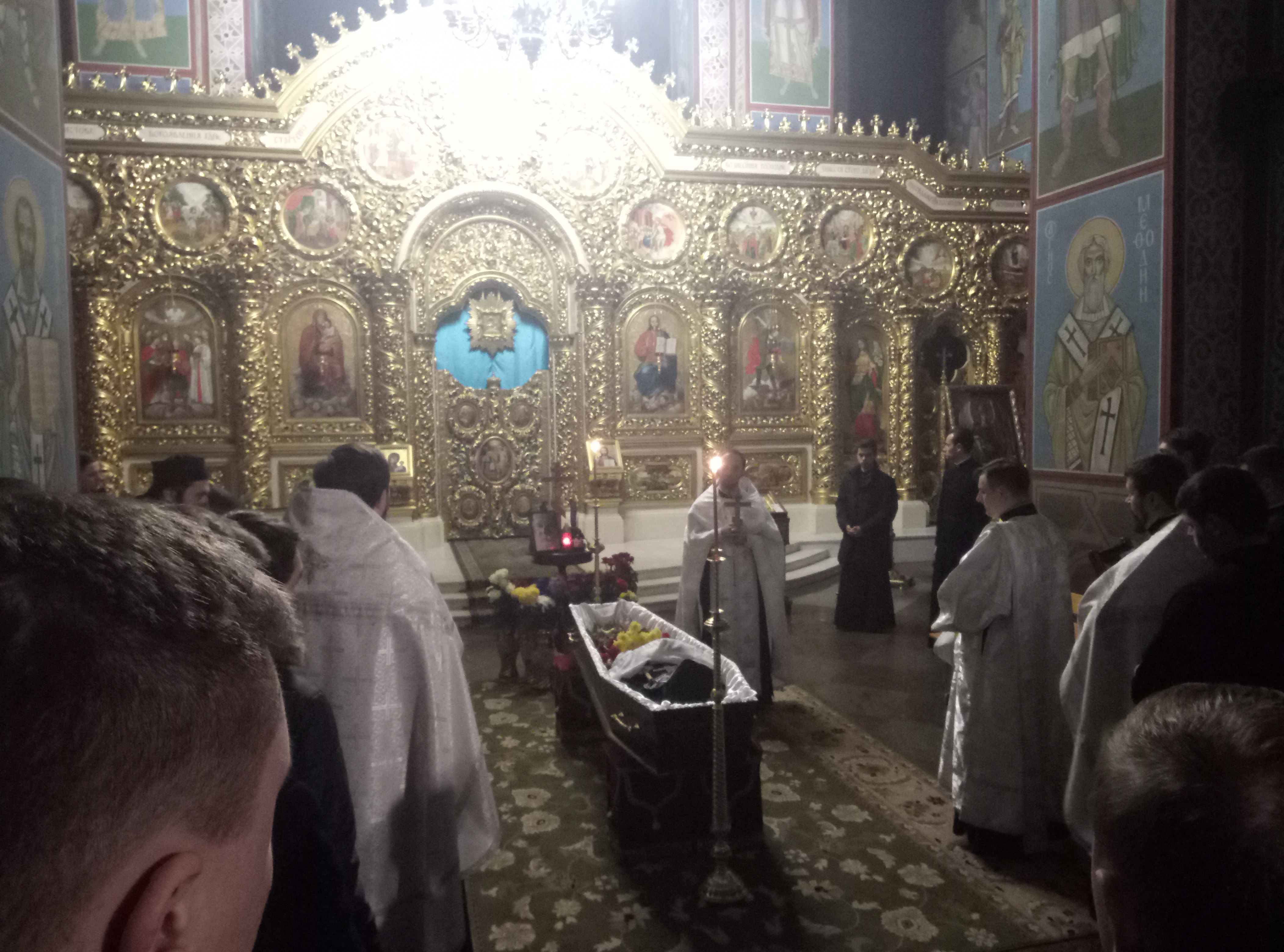 панахида за монахом у Михайлівському Золотоверхому Монастирі.